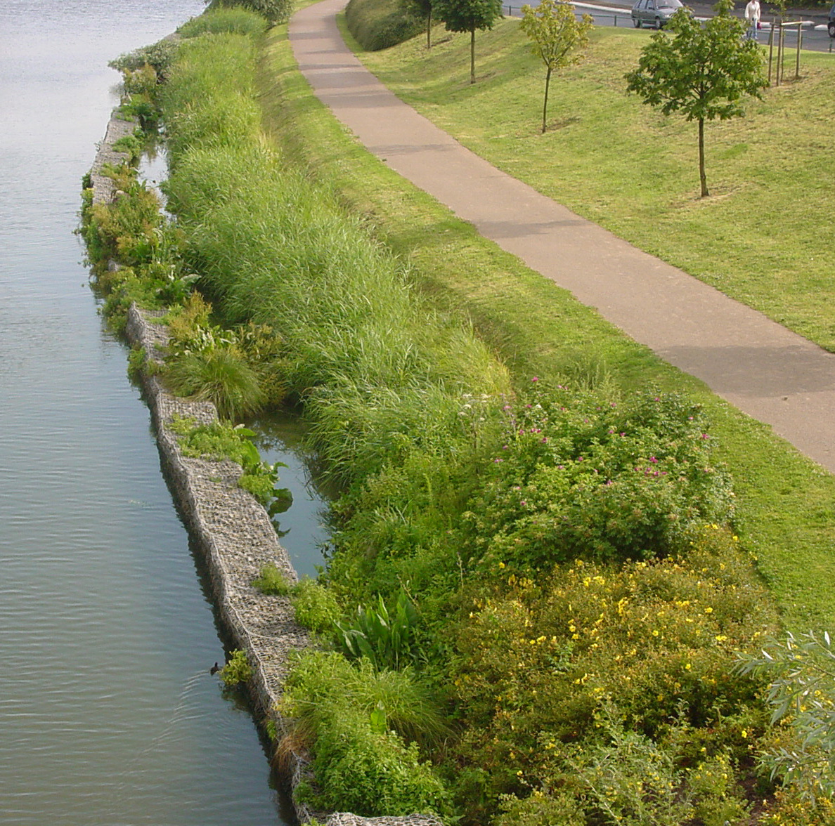 Lagunage linéaire en bordure de canal, mis en place par Voies Navigables de France (VNF) dans le nord de la France, entre Lambersart et Lille, sur la Deûle canalisée.